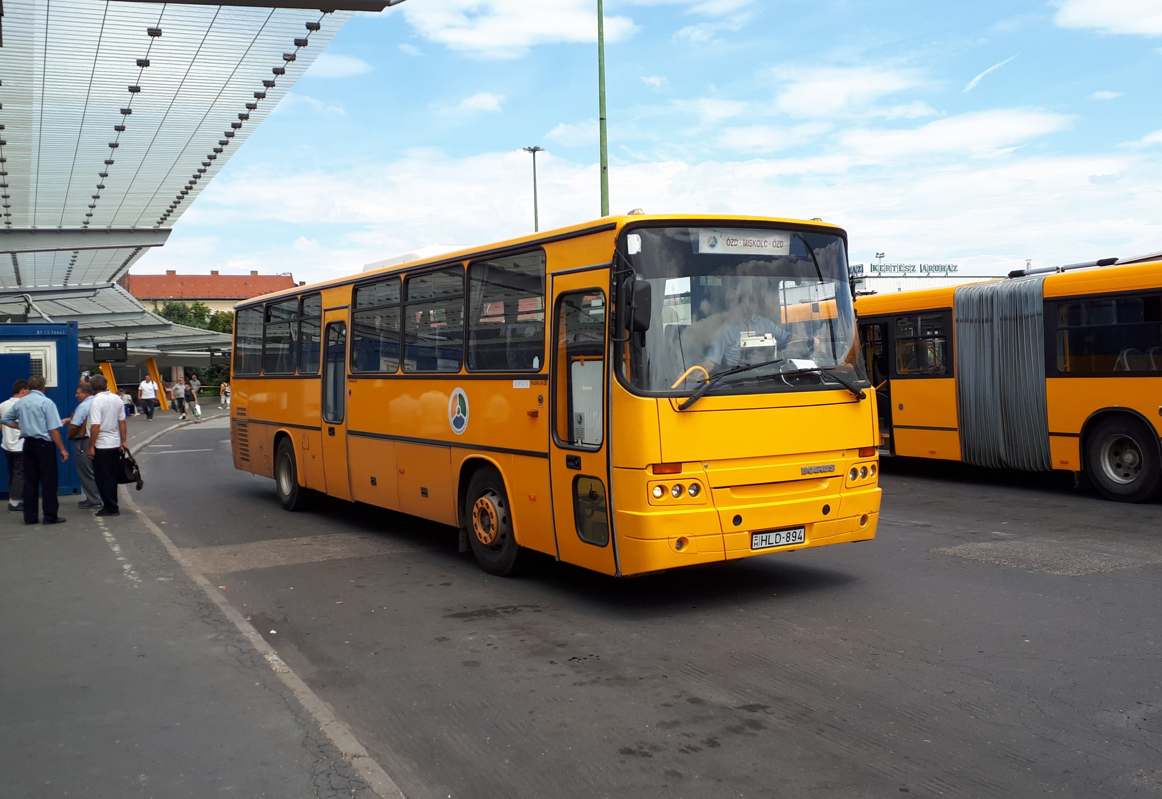 Az ÉMKK HLD-894 rendszámú Ikarus C56 típusú busza Miskolcon, a 3770-es helyközi járaton.